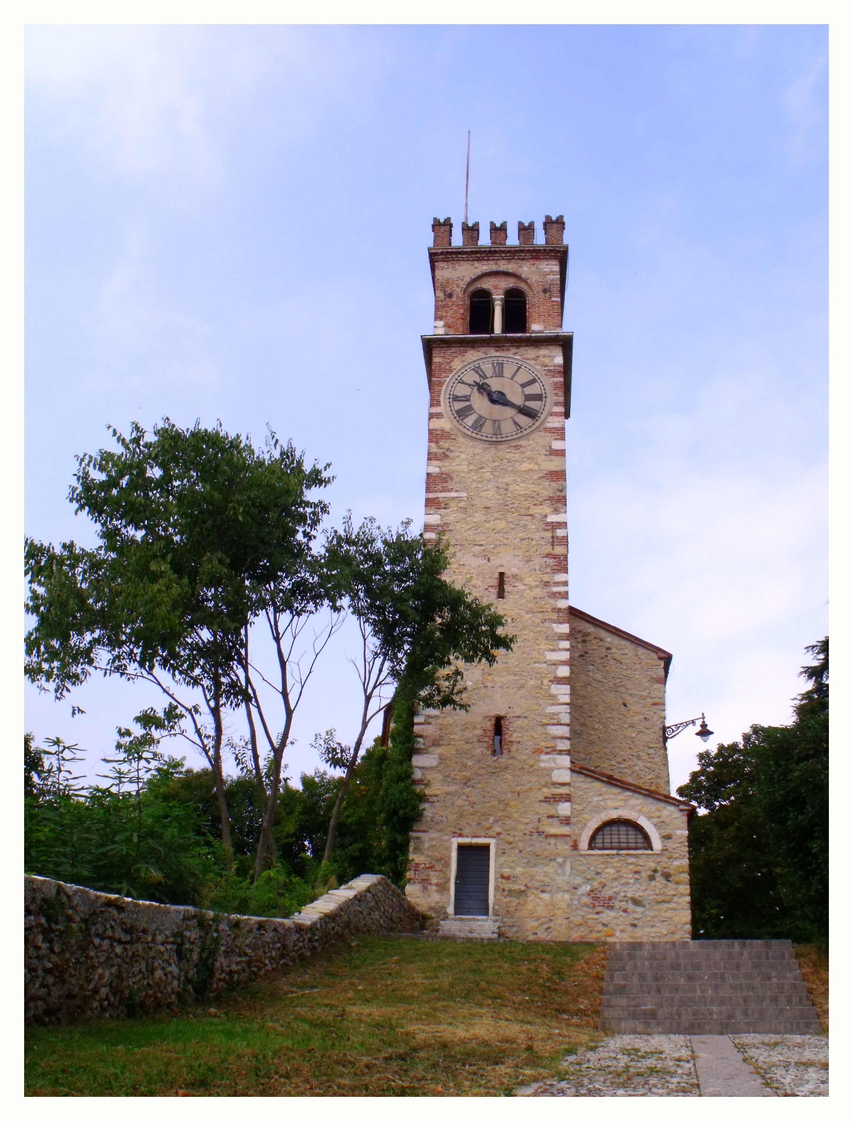 ex Chiesa di Santa Maria della Neve (altrimenti detta “Castello”), Tajara e scalette che salgono alla collina This is a photo of a monument which is part of cultural heritage of Italy.